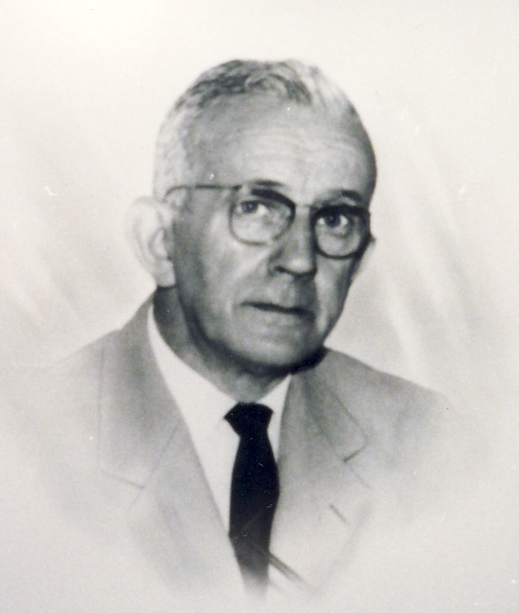 Fotogtafía de José Simón Cabarga